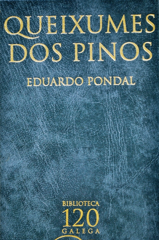 Detalle da portada dun volume de Queixumes dos pinos de Eduardo Pondal, da Biblioteca Galega 120.